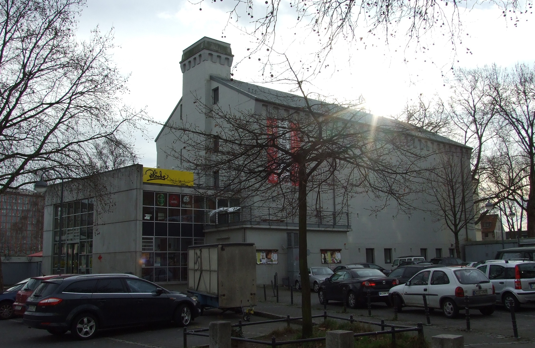 Bunker, Berliner Str. 20This is a photograph of an architectural monument.